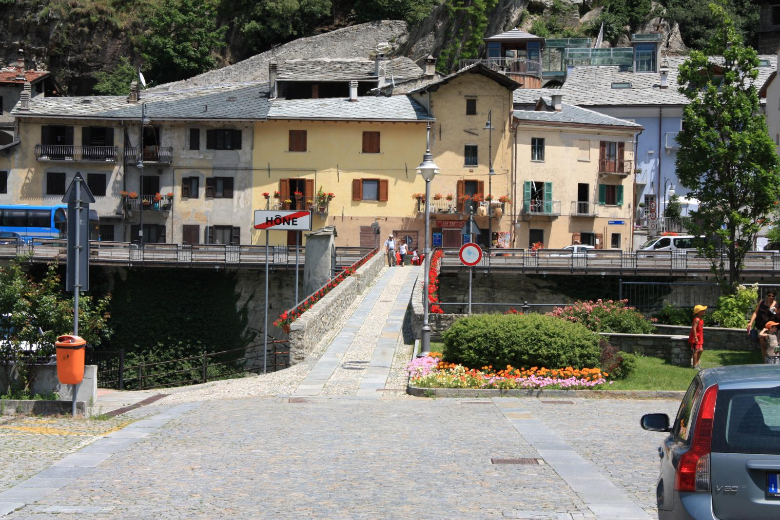 foto di Bard da Hone (oltre il ponte). Bard, Valle d'Aosta, Italia.